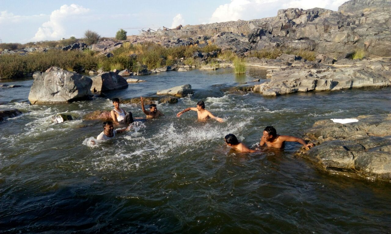 జలపాతం దగ్గర సందర్శకుల జలకేళి